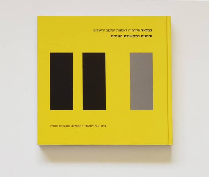 הספר סימנים בתקשורת חזותית, הוצאת בצלאל 2010 קרן ארתור גולדרייך